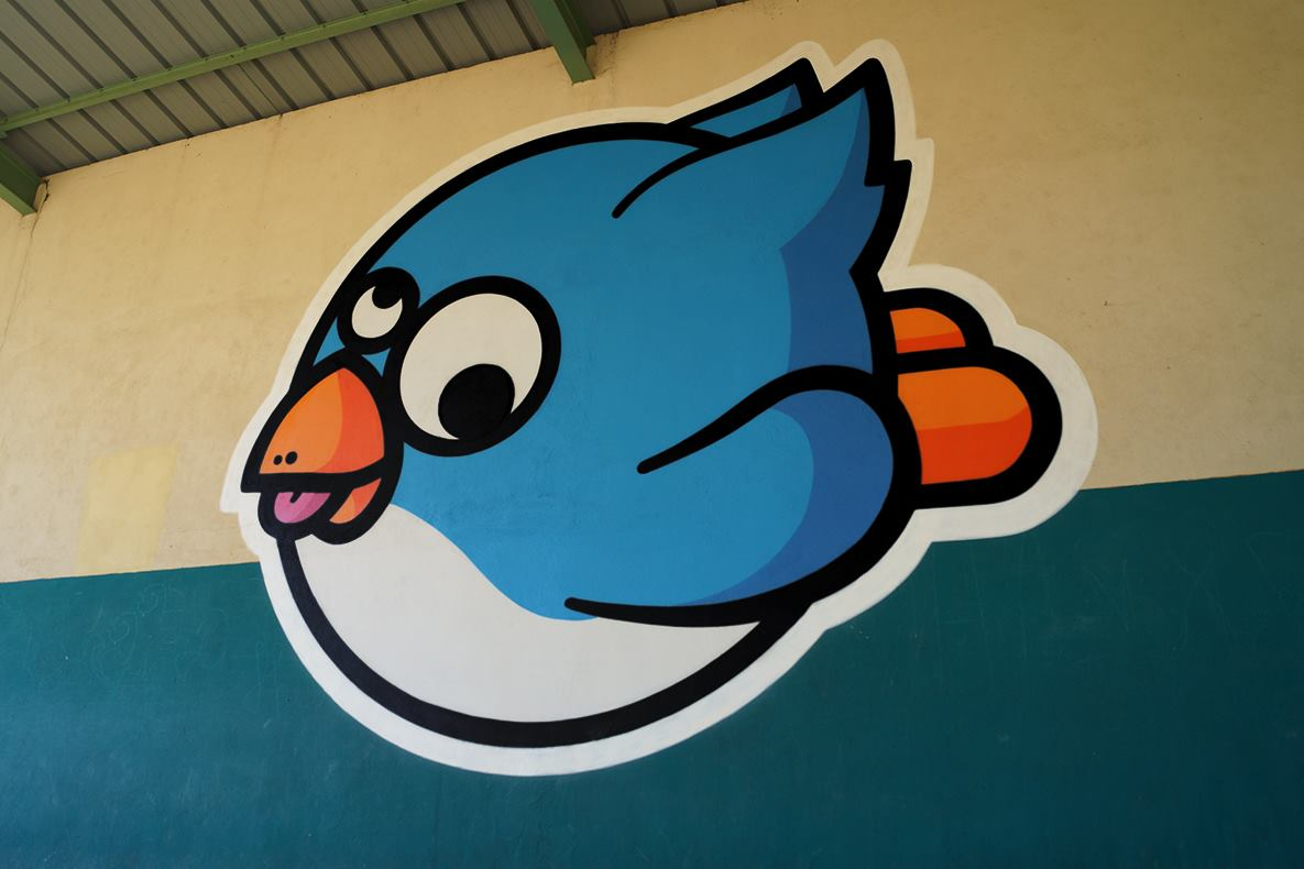 la photo est prise a mon école